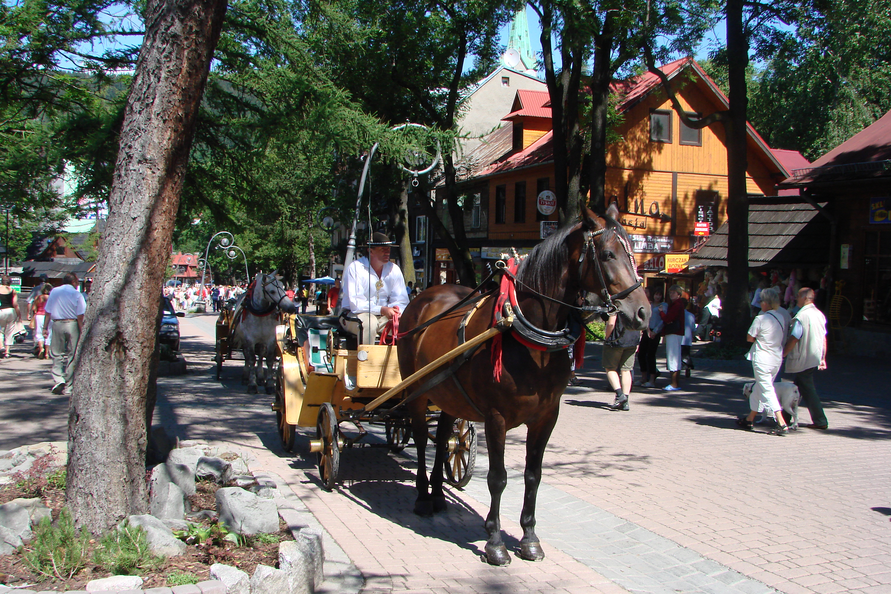 Zakopane, Poland